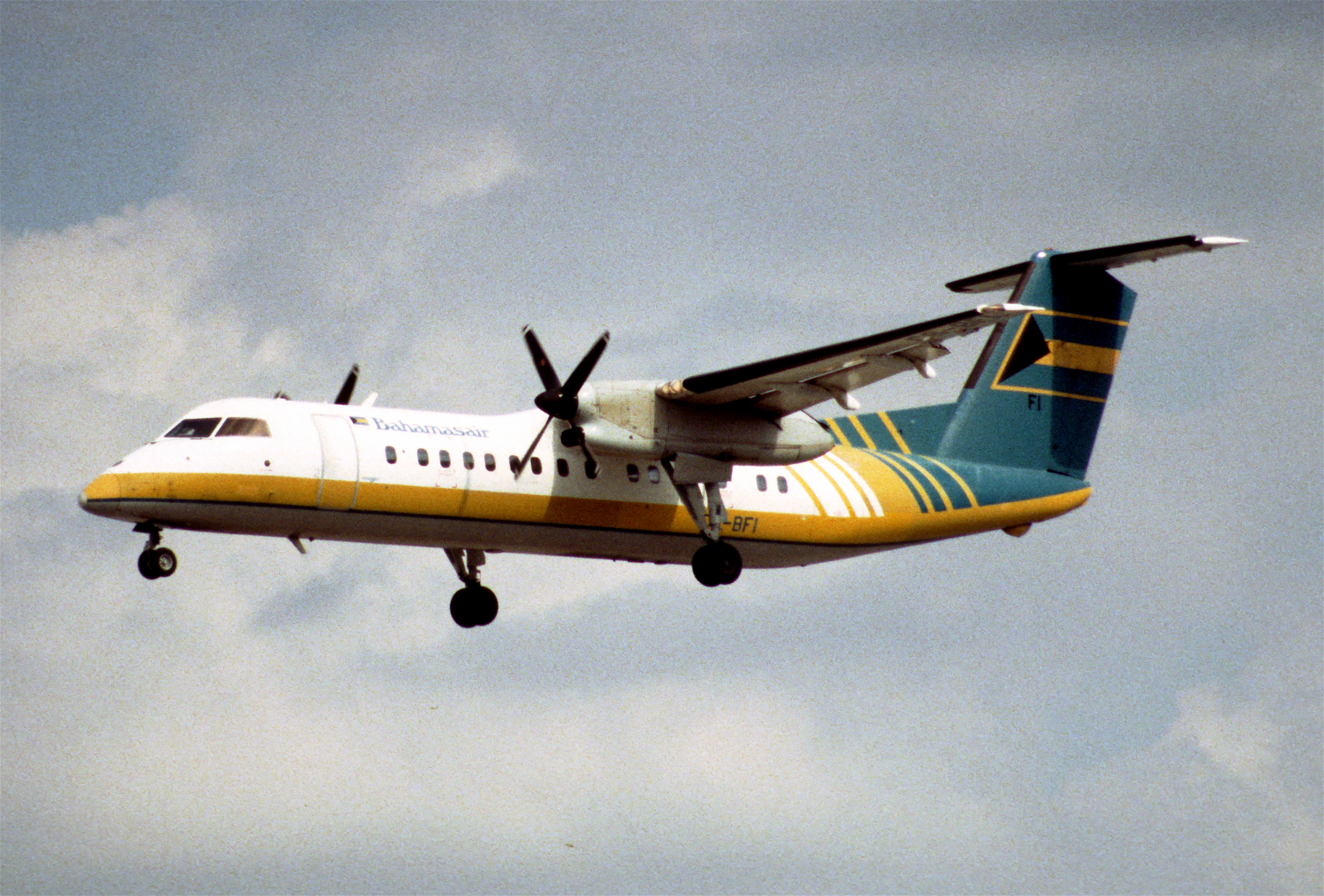 12ee - BahamasairDHC-8-311 Dash 8; C6-BFI@MIA;31.01.1998